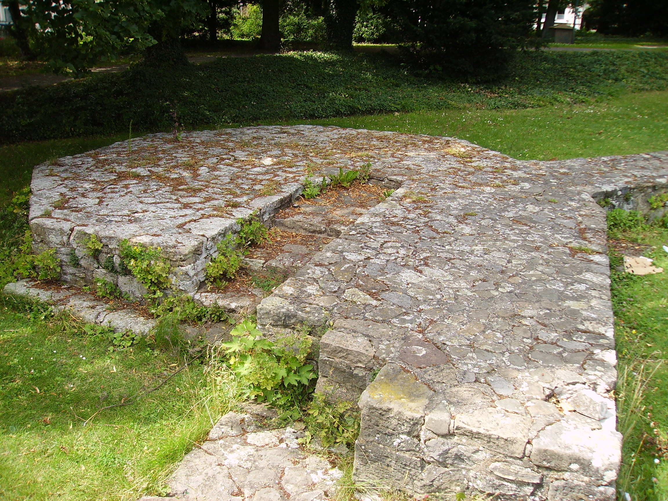 Stiftsruine St. Georg in Goslar: Turmfundament nordwestlich vor Oktogon